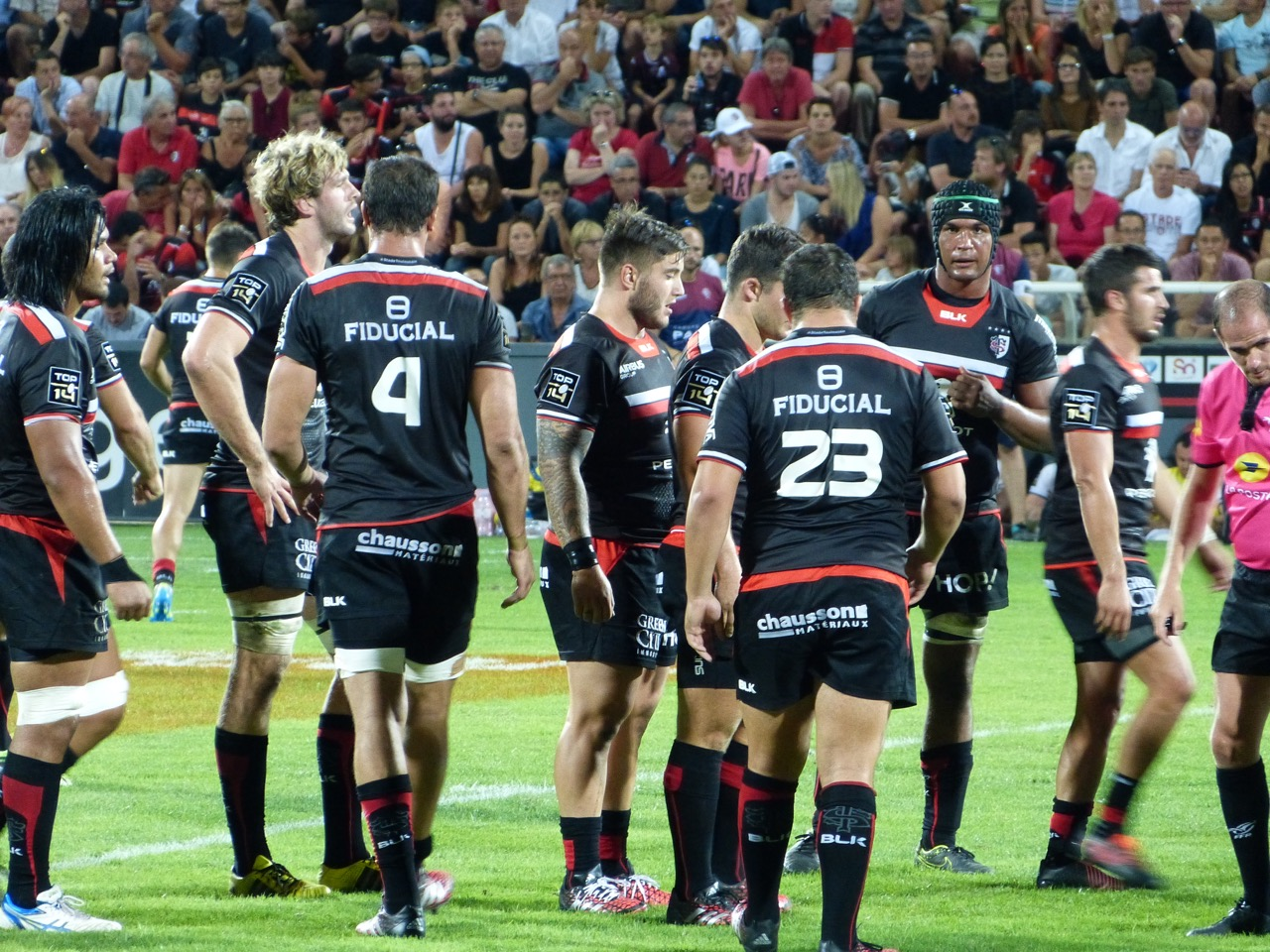 Photo de Thierry Dusautoir et son équipe lors du match du Stade Toulousain contre l'Union Bordeaux-Bègles du samedi 27 août 2016